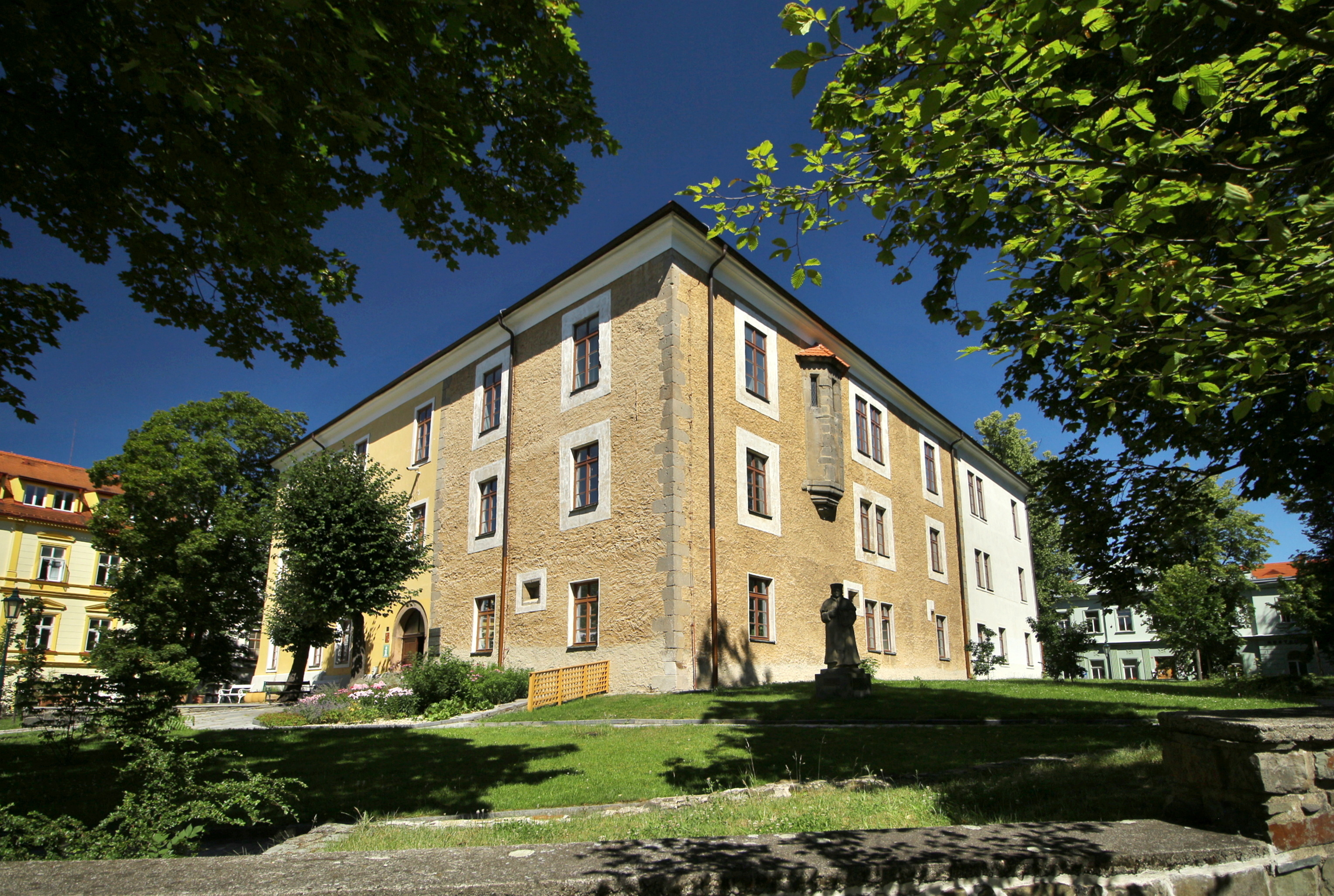 Arcibiskupský zámeček Ernestinum v Příbrami